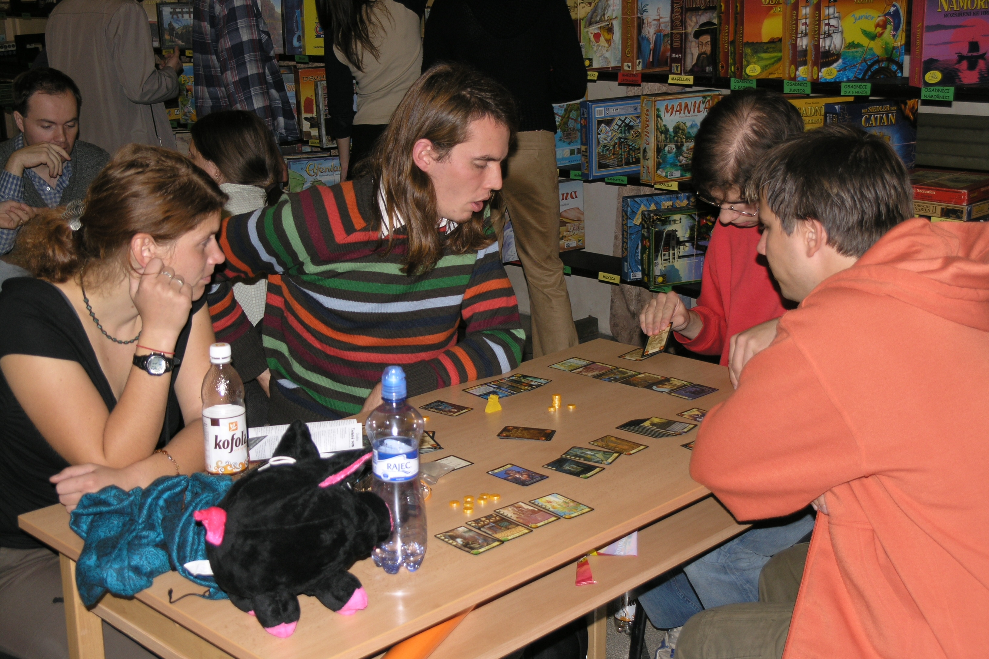 Herní festival Deskohraní 2008 - Citadela